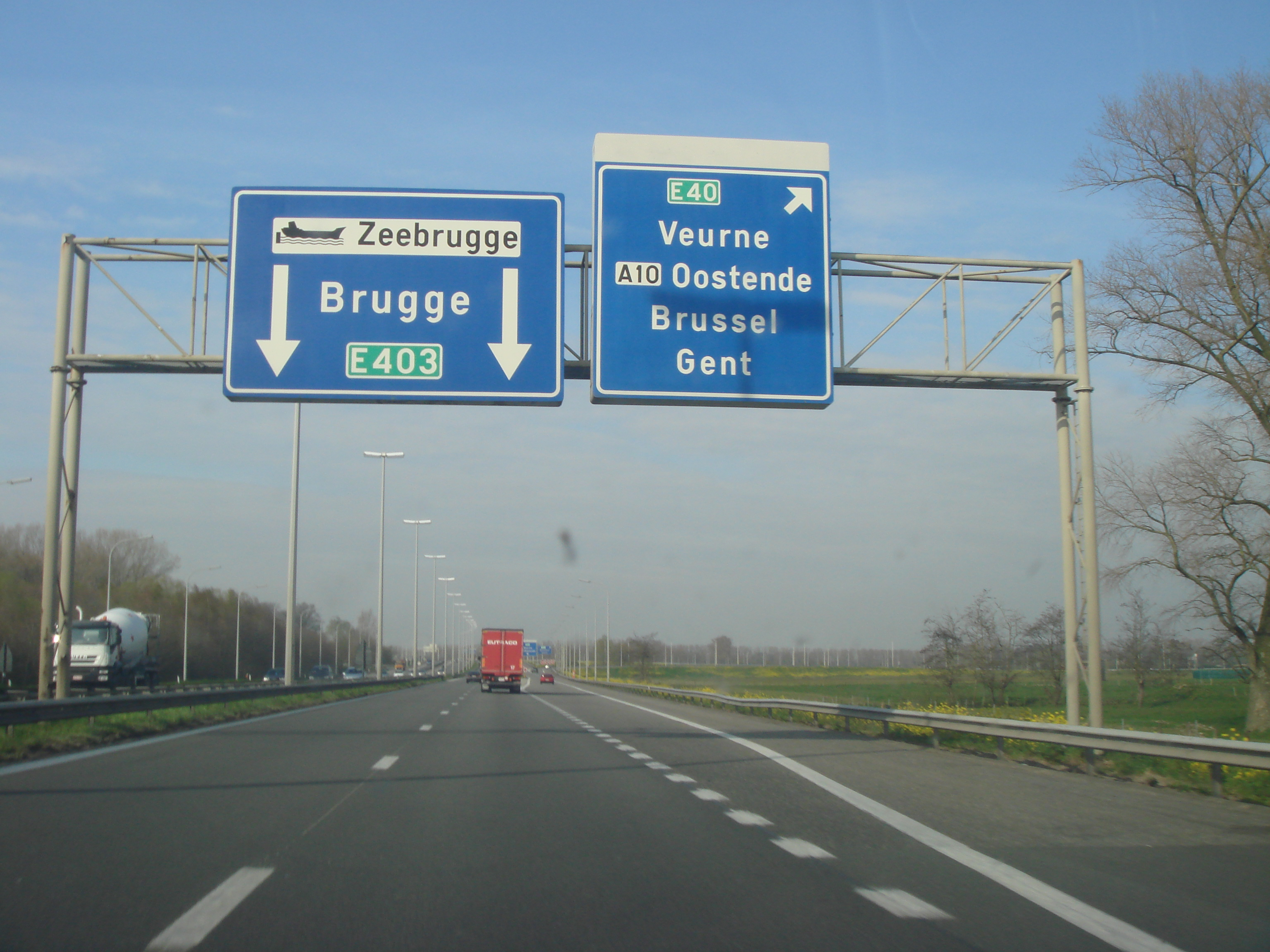 Route européenne E403 en Belgique en direction de Bruges (Brugge)